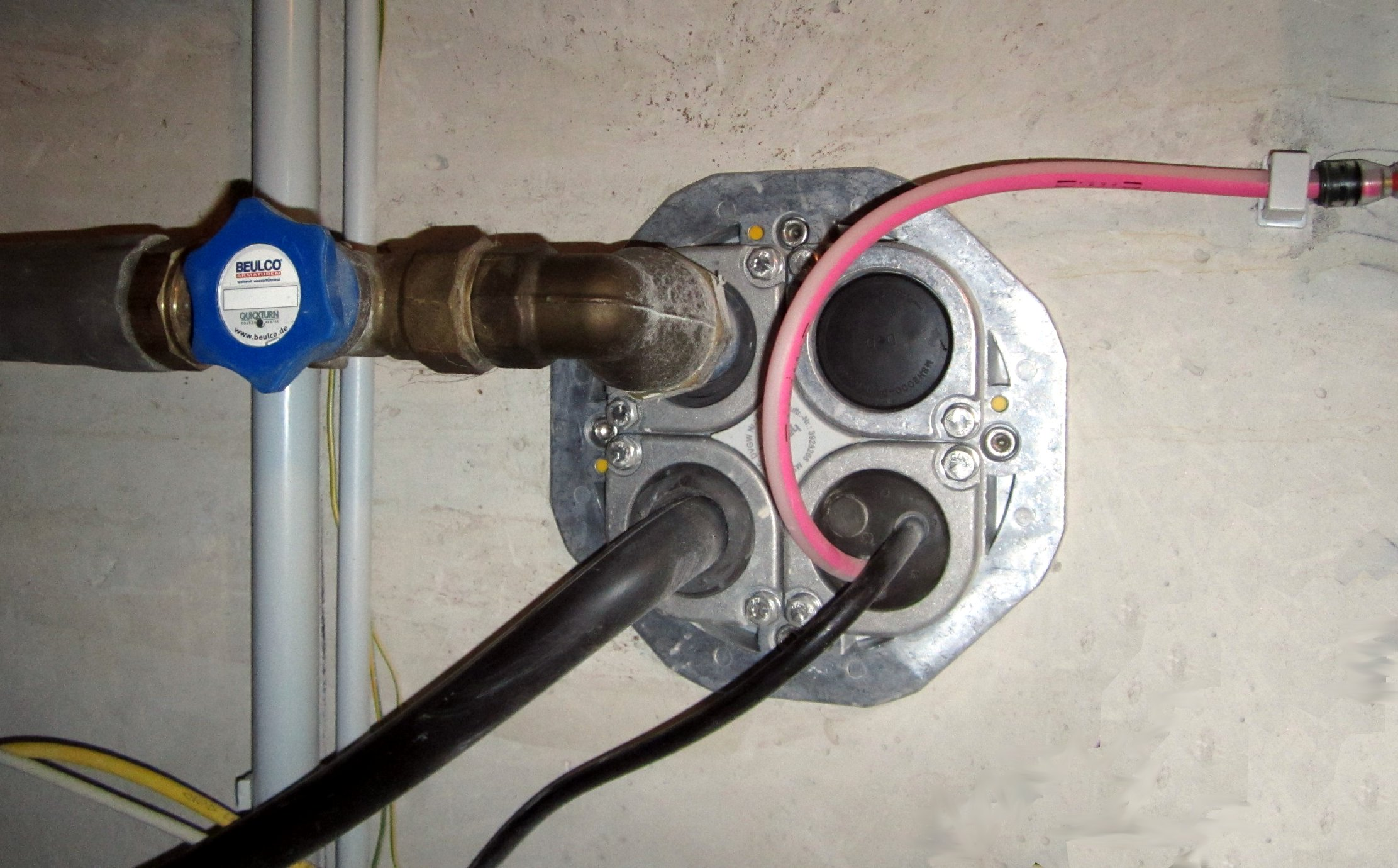 Mehrsparten-Hausanschluss, belegt mit Wasserleitung, Strom, Telefon und Speedpipe für Glasfaseranschluss